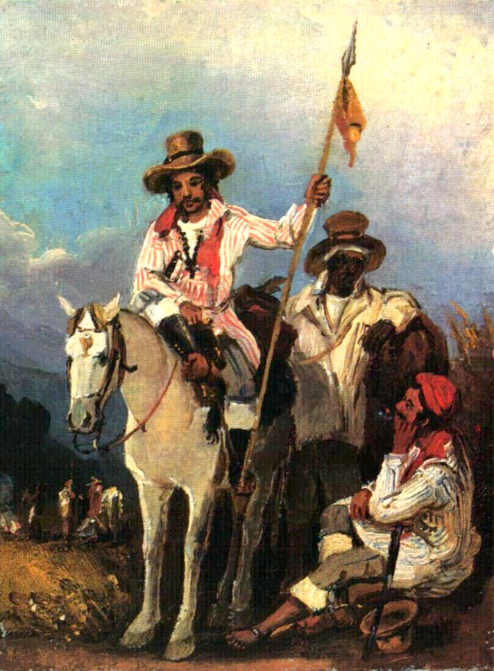 Llaneros.